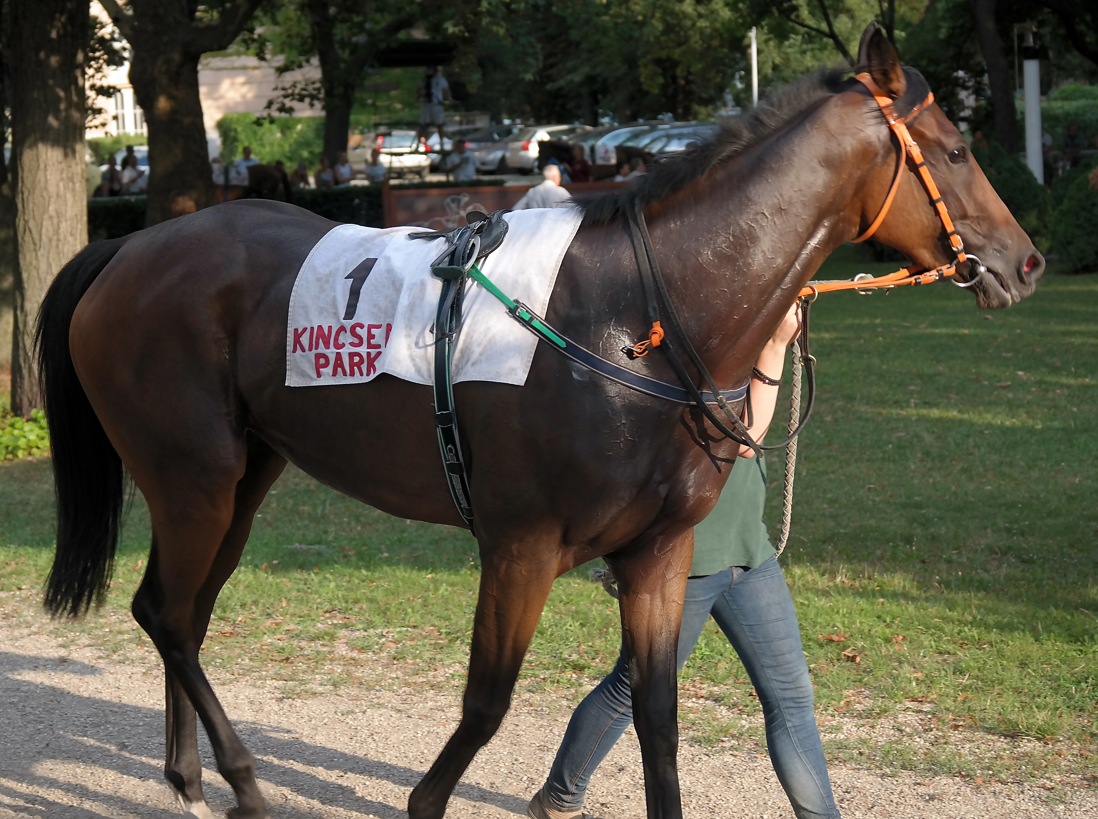 Magyar Kancadíj 2014. A harmadik helyezett: Álomtenger